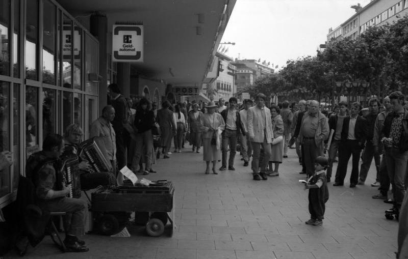 Juni 1988 Frankfurt am Main, Fußgängerzone